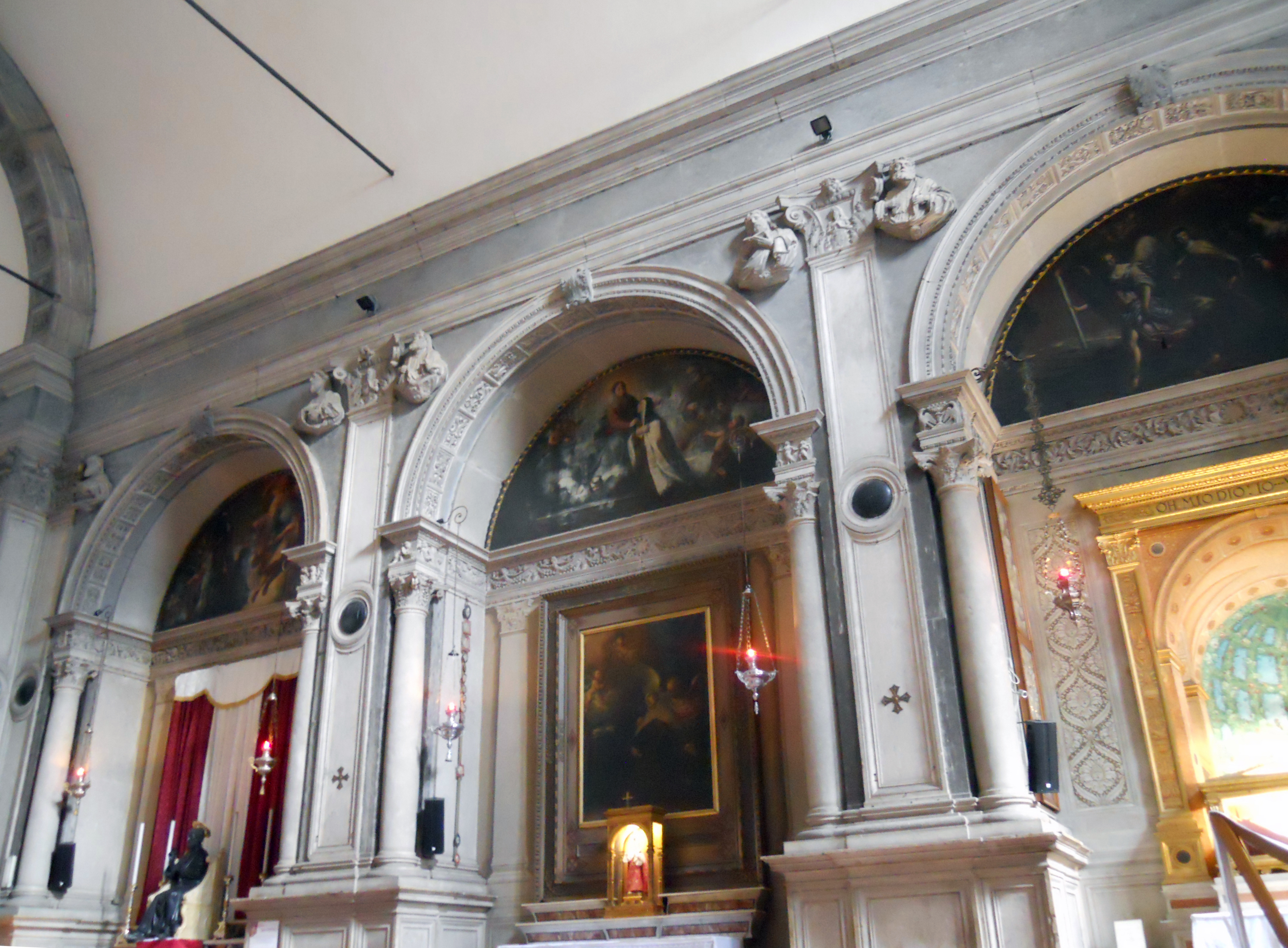 Chiesa di San Pietro in Oliveto (Brescia), lato destro (sud) della navata